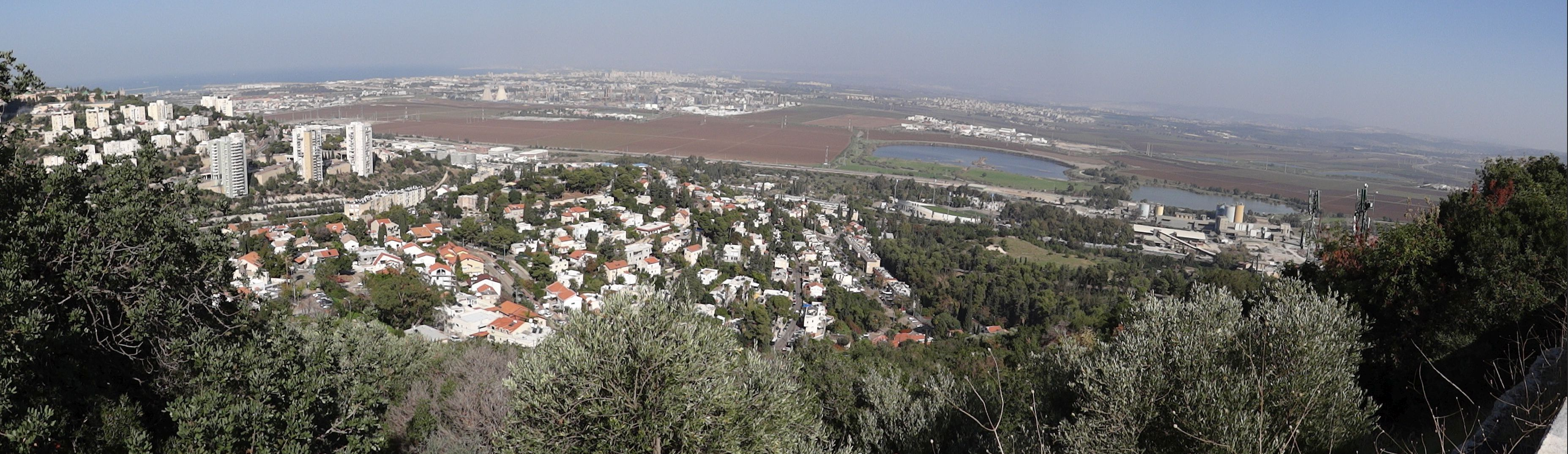 תצפית פנורמית על גבעת העמדות וגבעת נשר מכביש 7212, על הגבעה שוכנים שרידי בונקרים ממלחמת העולם השנייה מתקופת המנדט הבריטי ועמדות תותחים ששימשו להגנה על האזור כנגד התקפות אוויריות.